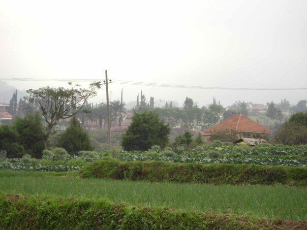 persawahan sumbergondo